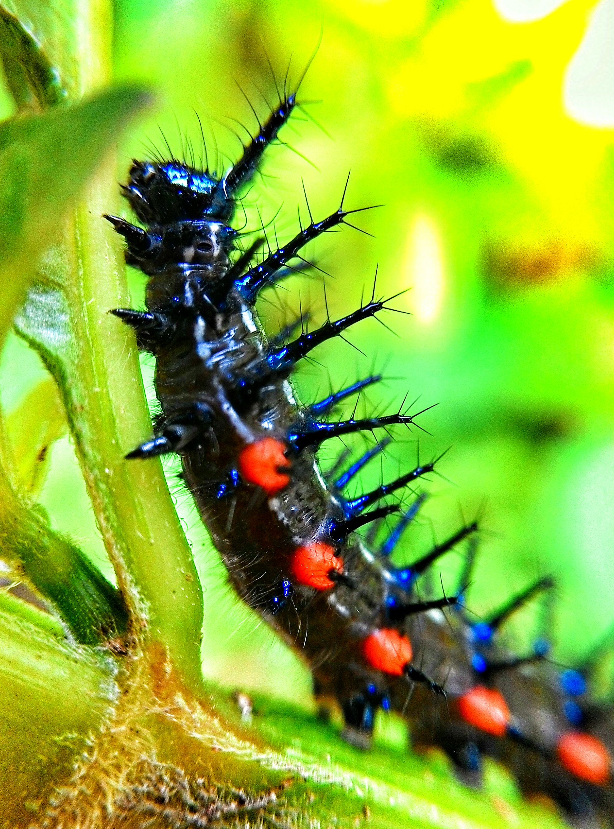 Ulat termasuk hewan insecta. Ulat ini memiliki perlindungan di tubuhnya berupa duri-duri yang menyerupai ranting pohon. Pinggir badan berwarna merah nyala. Jika dalam bahaya, durinya akan mengeluarkan cairan lengket berwarna kuning.